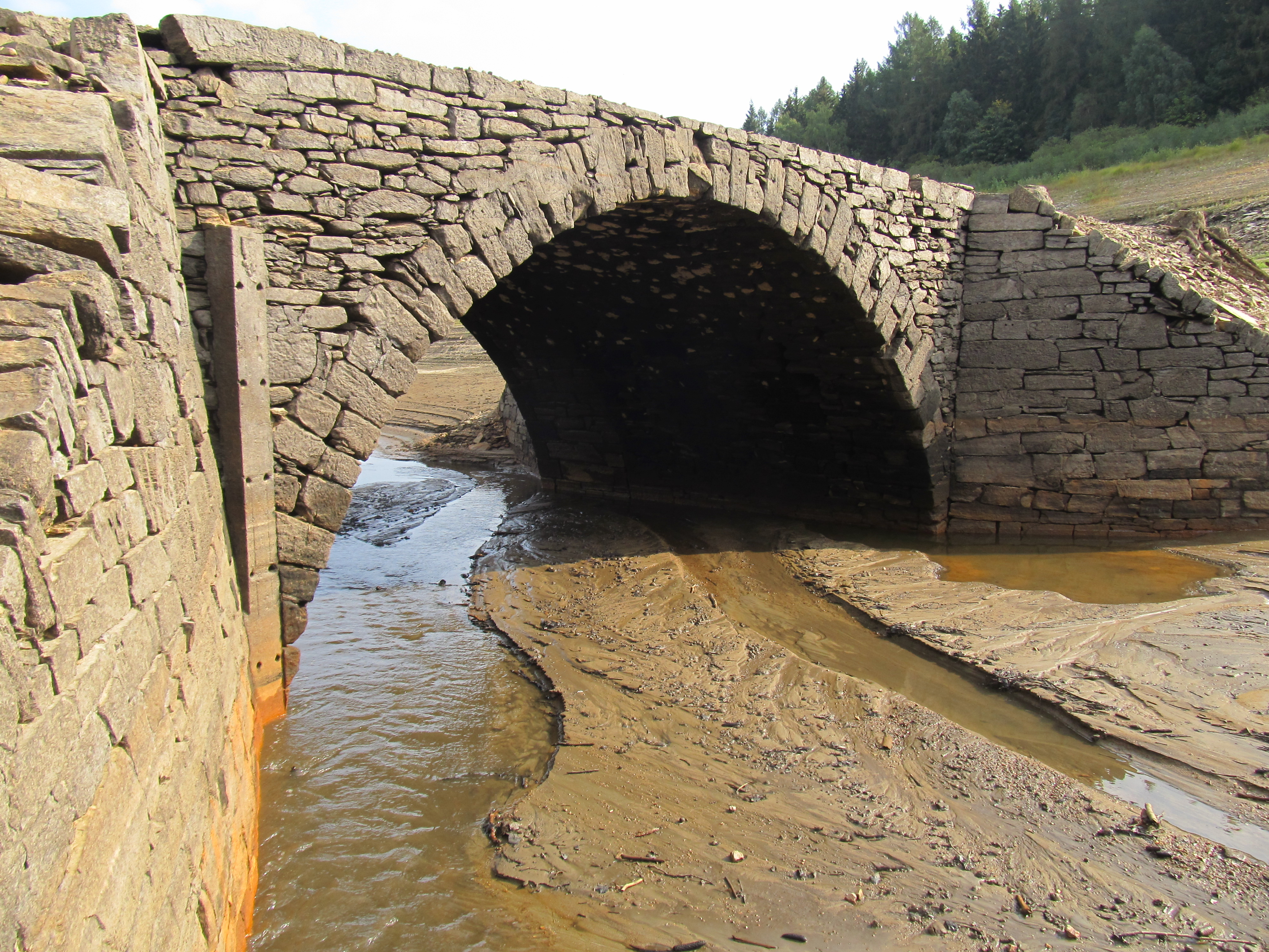 Brücke Steinbrückmühle aus Südwesten gesehen, Talsperre Lehnmühle, Sachsen